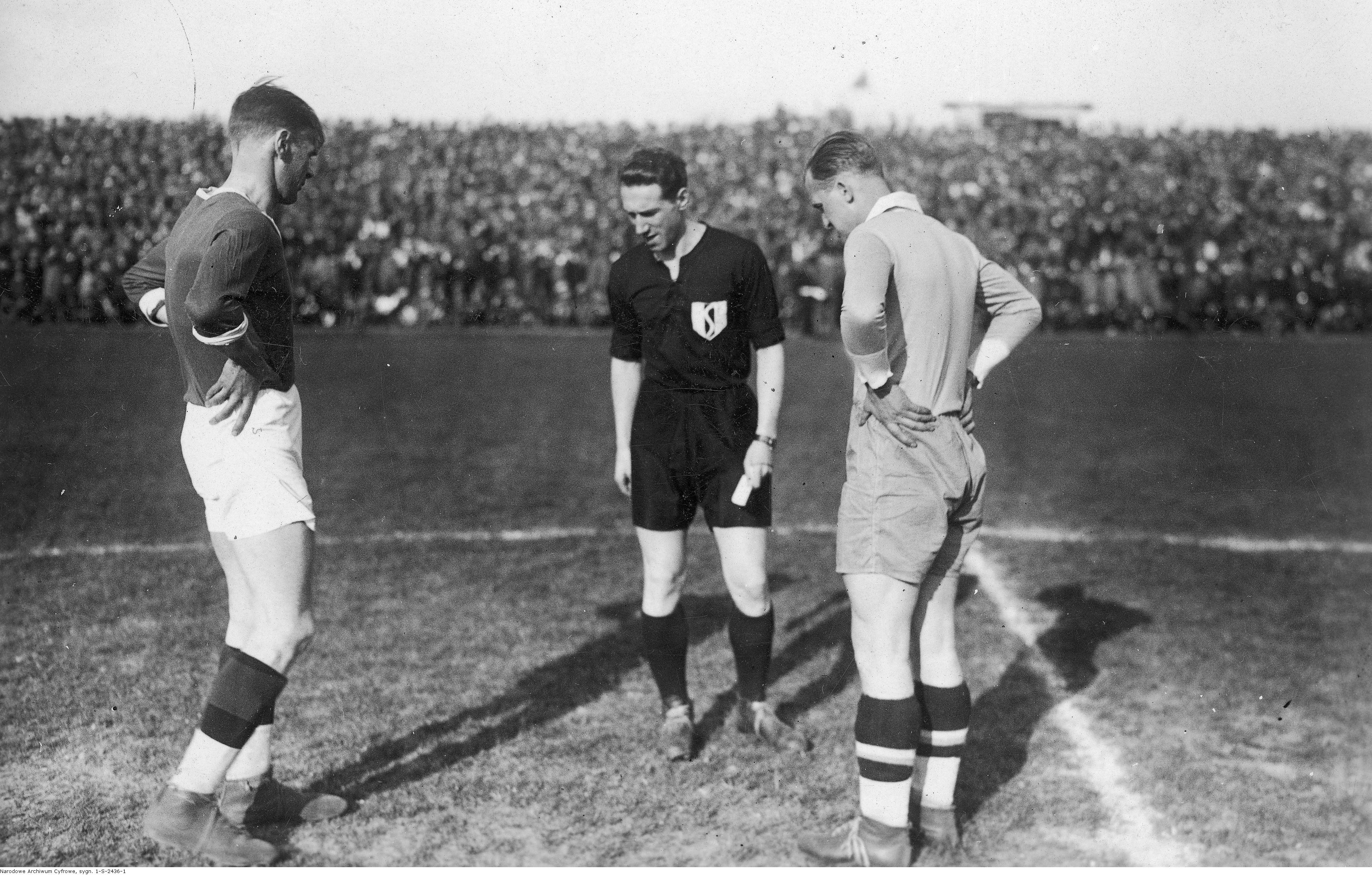 Losowanie boiska przed meczem.